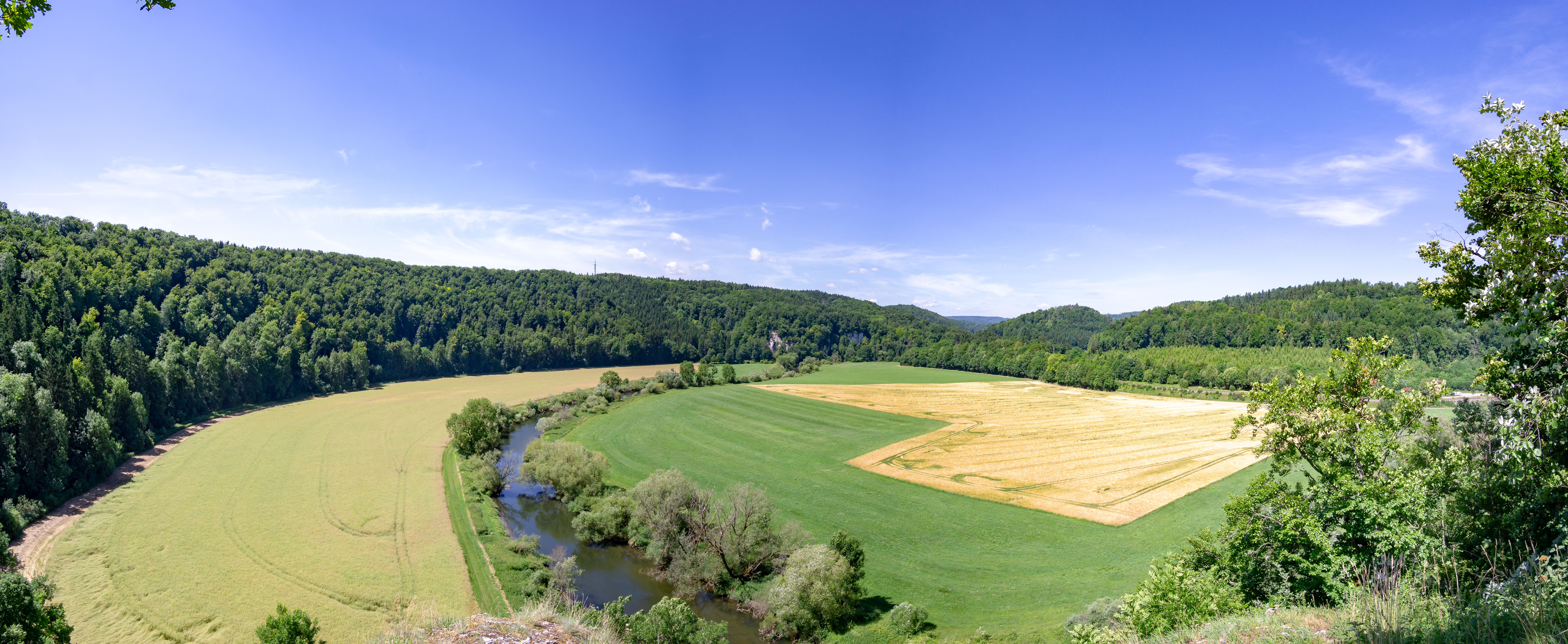 Fürstlicher Park Inzigkofen im Landschaftsschutzgebiet Donau- und Schmeiental LSG-Nummer 4.37.036 - Blick von "Känzele".